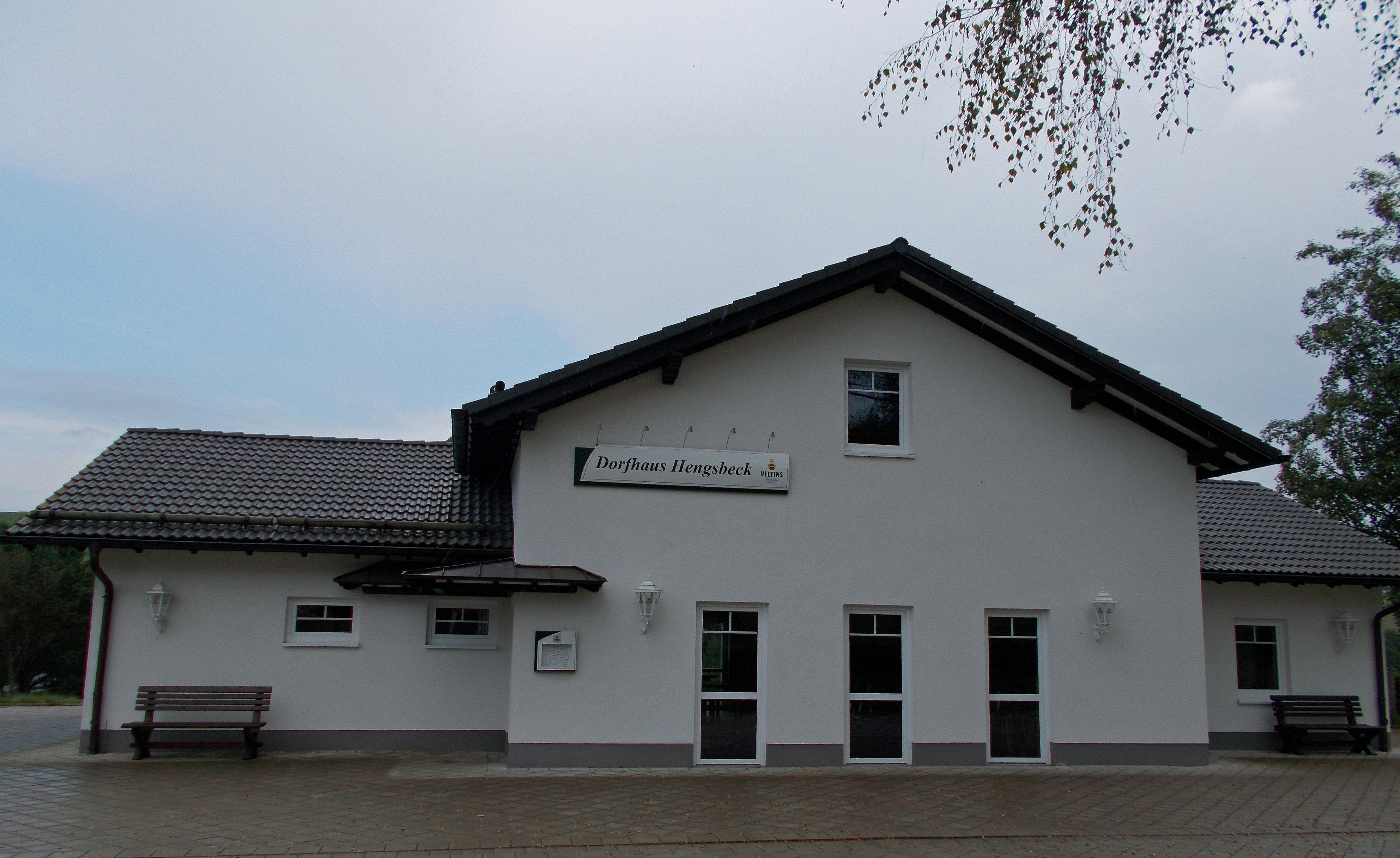 Eslohe-Hengsbeck, Dorfhaus, Germany